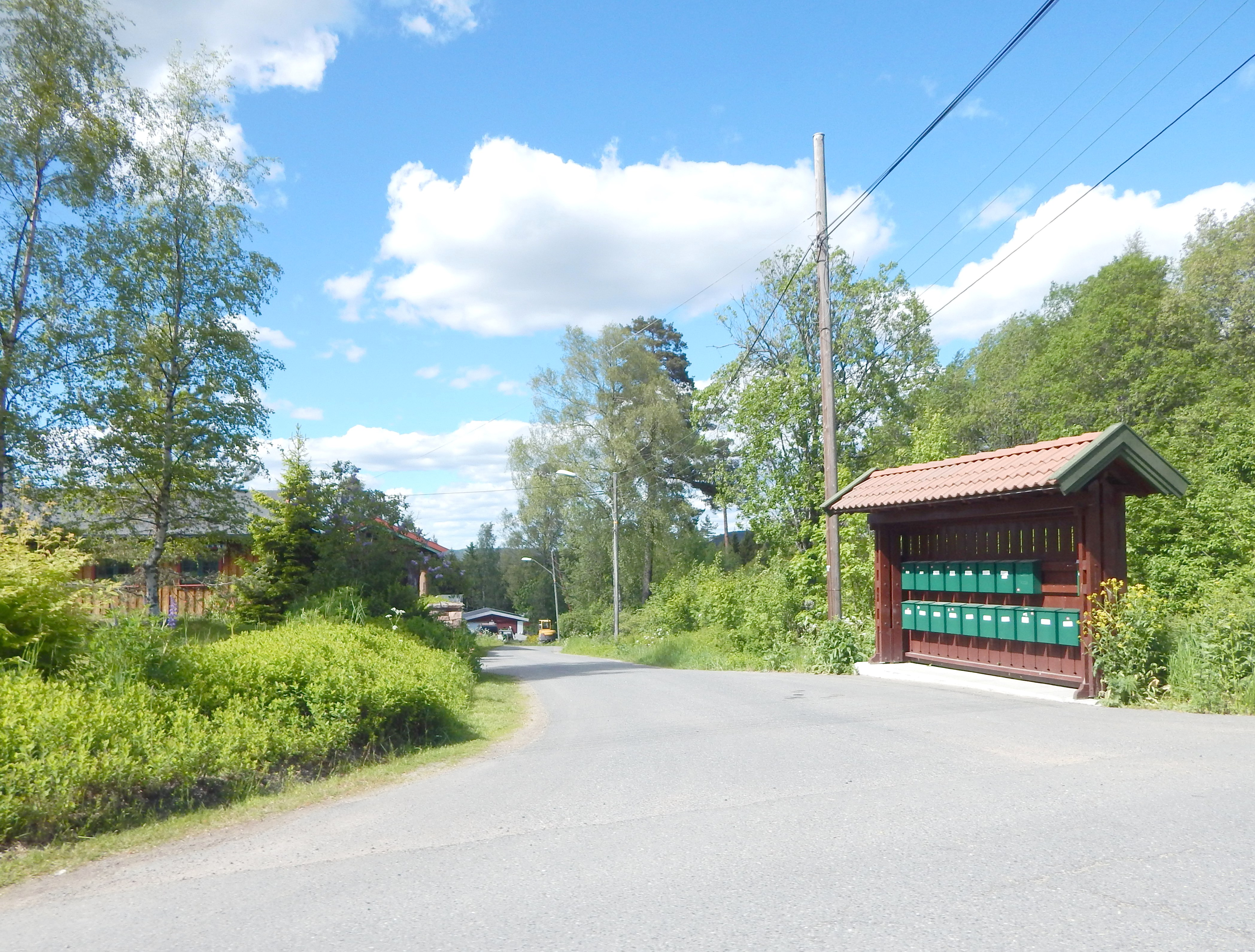 Grytebekkveien